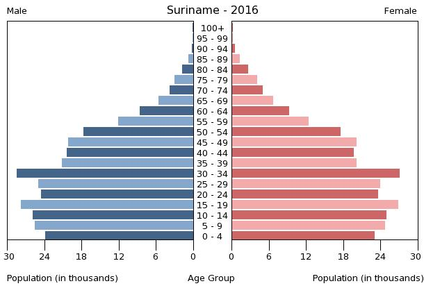 Suriname